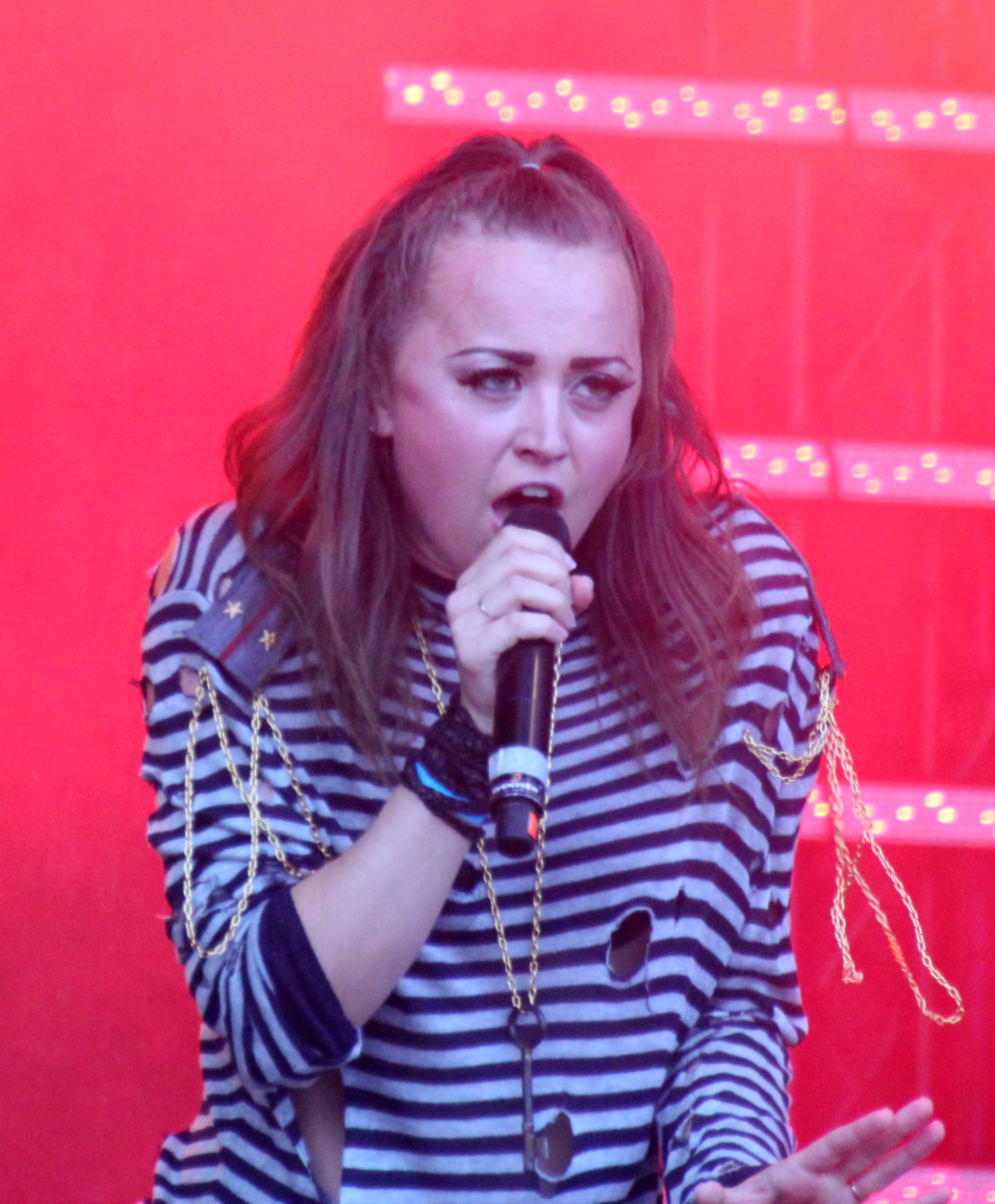 Teele Viira esinemas Õllesummeril.